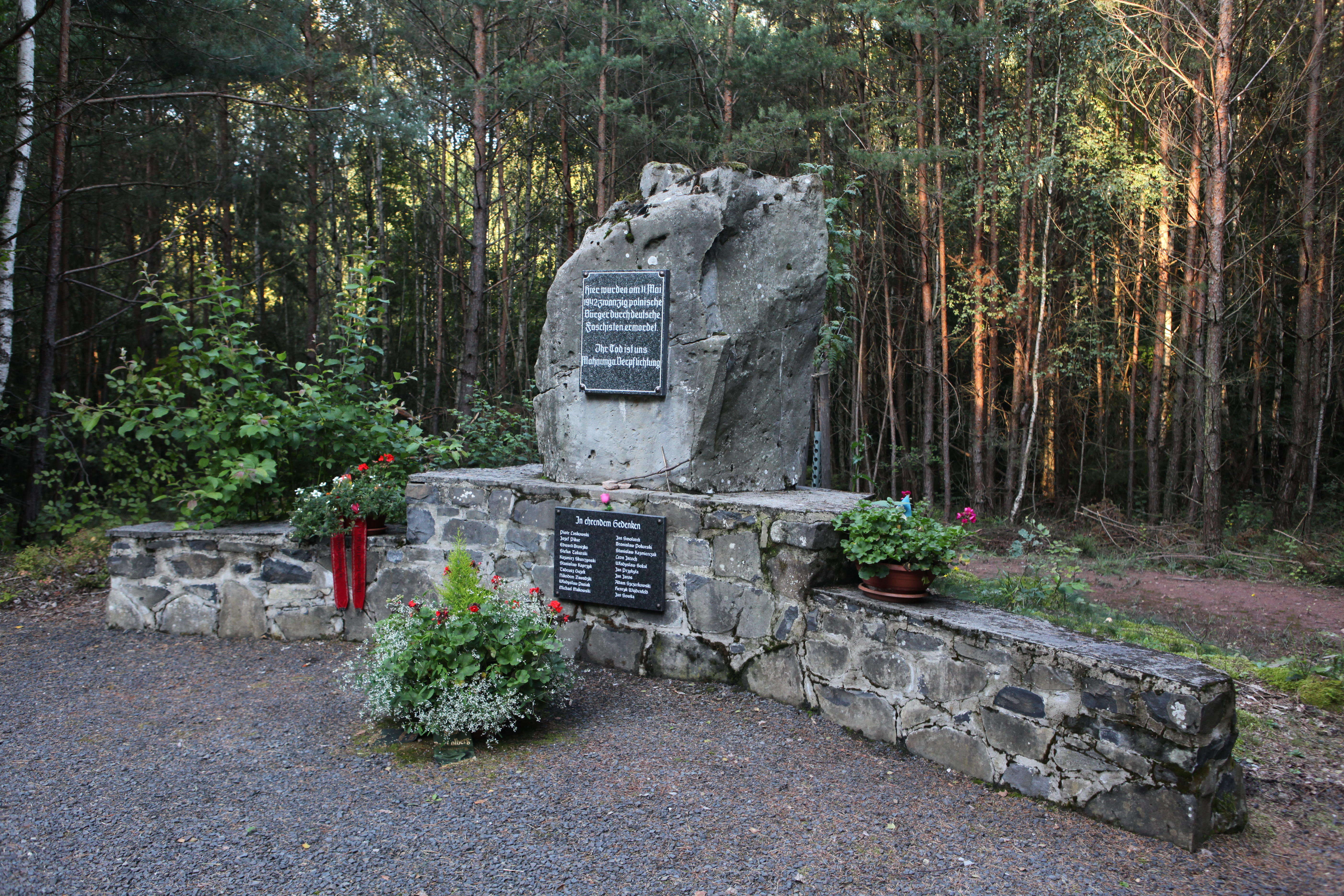 Denkmal für zwanzig am 11. Mai 1942 gehängte polnische Häftlinge im Wald an der Straße von Poppenhausen nach Einöd, Landkreis Hildburghausen